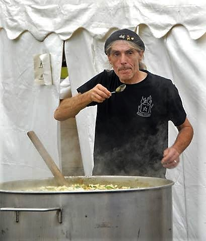 Koch beim Abschmecken – hier bei der Zubereitung einer größeren Menge Suppe, die zur Verpflegung der Teilnehmer bei einer Veranstaltung dienen soll. Das Kochen erfolgt im Freien auf einer Gaskochstelle.